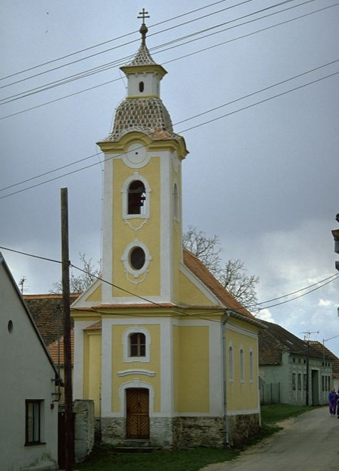 Kaple Panny Marie Bolestné v Čížově, místní části obce Horní Břečkov, okres Znojmo.